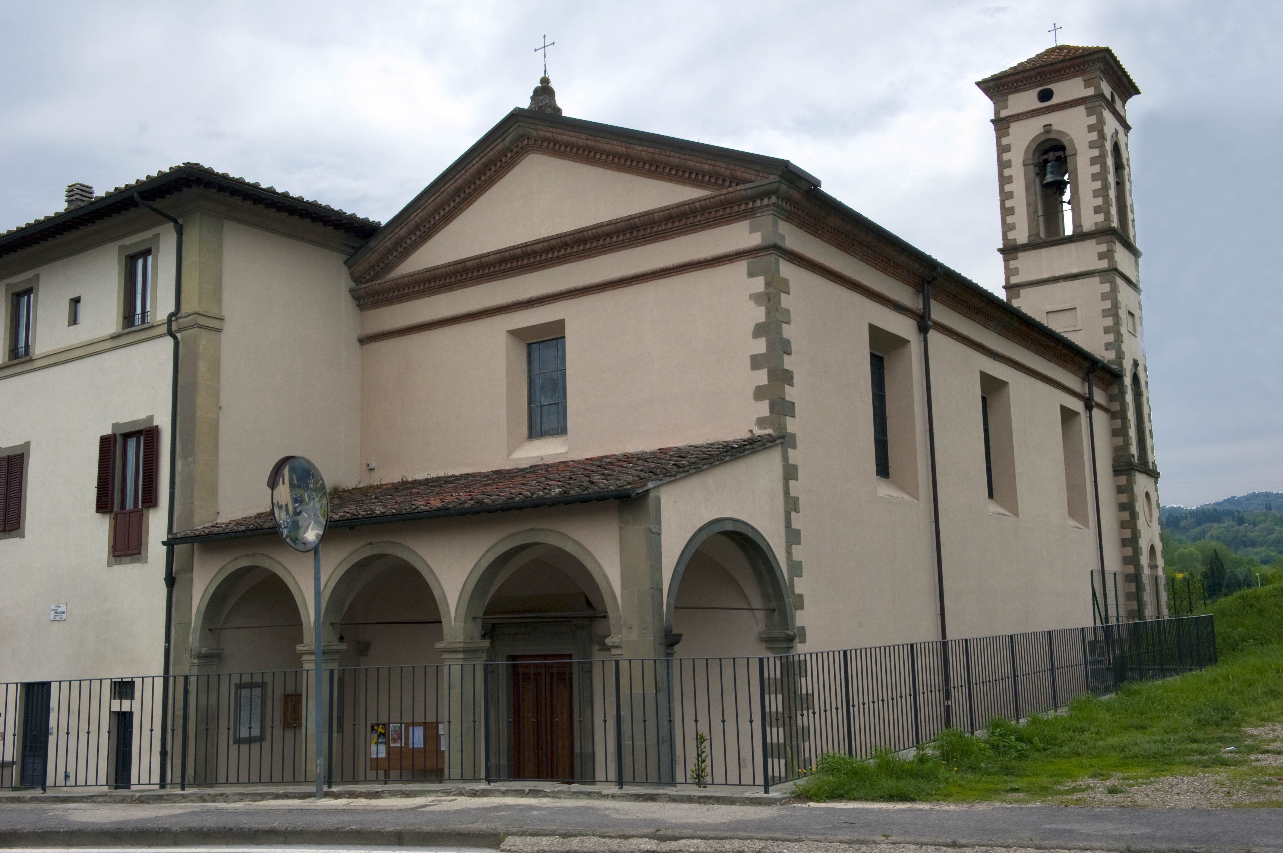 Santuario di Santa Maria al Ponterosso - Figline Valdarno - Firenze